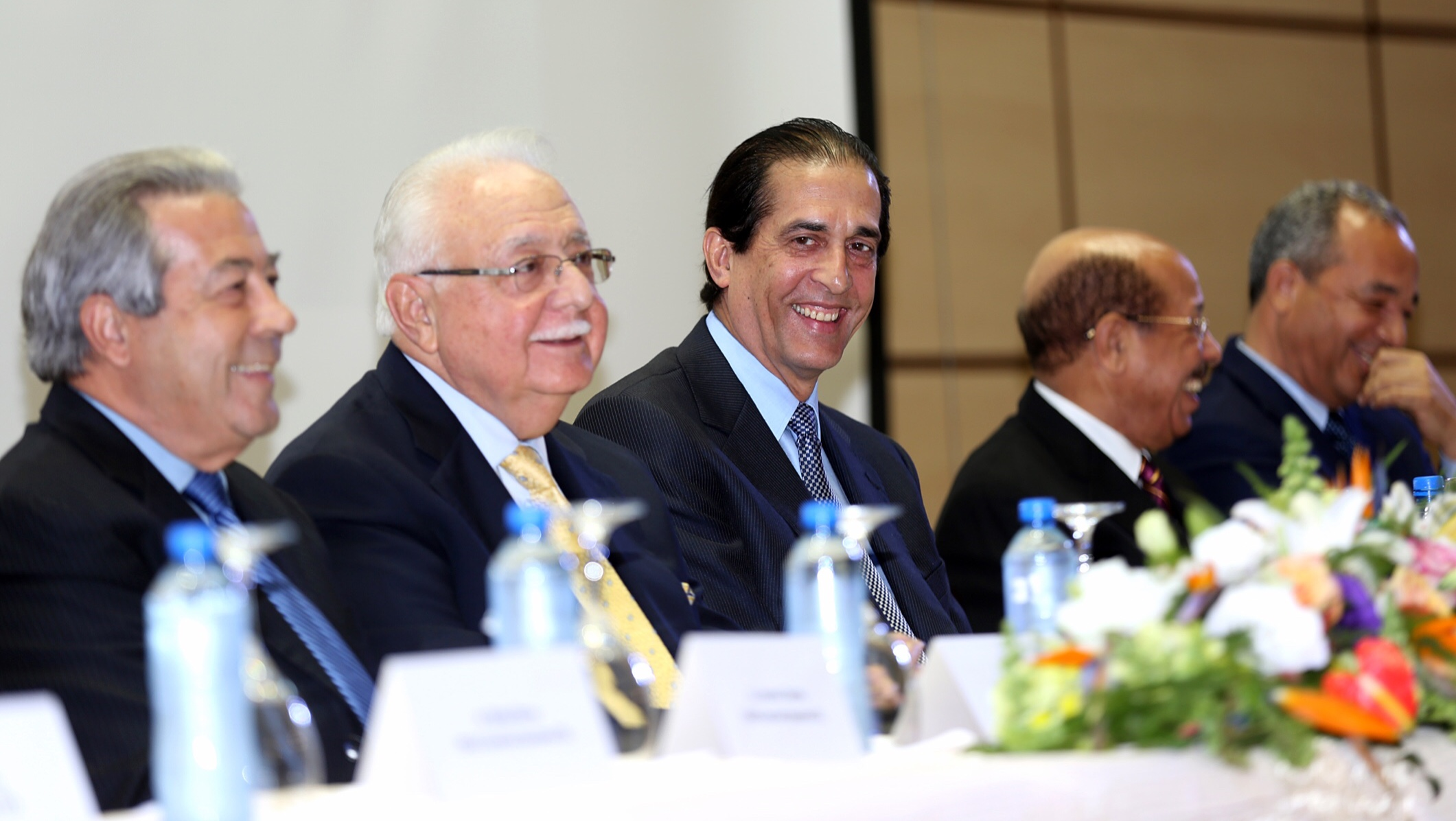 Firma del pacto eléctrico de la República Dominicana